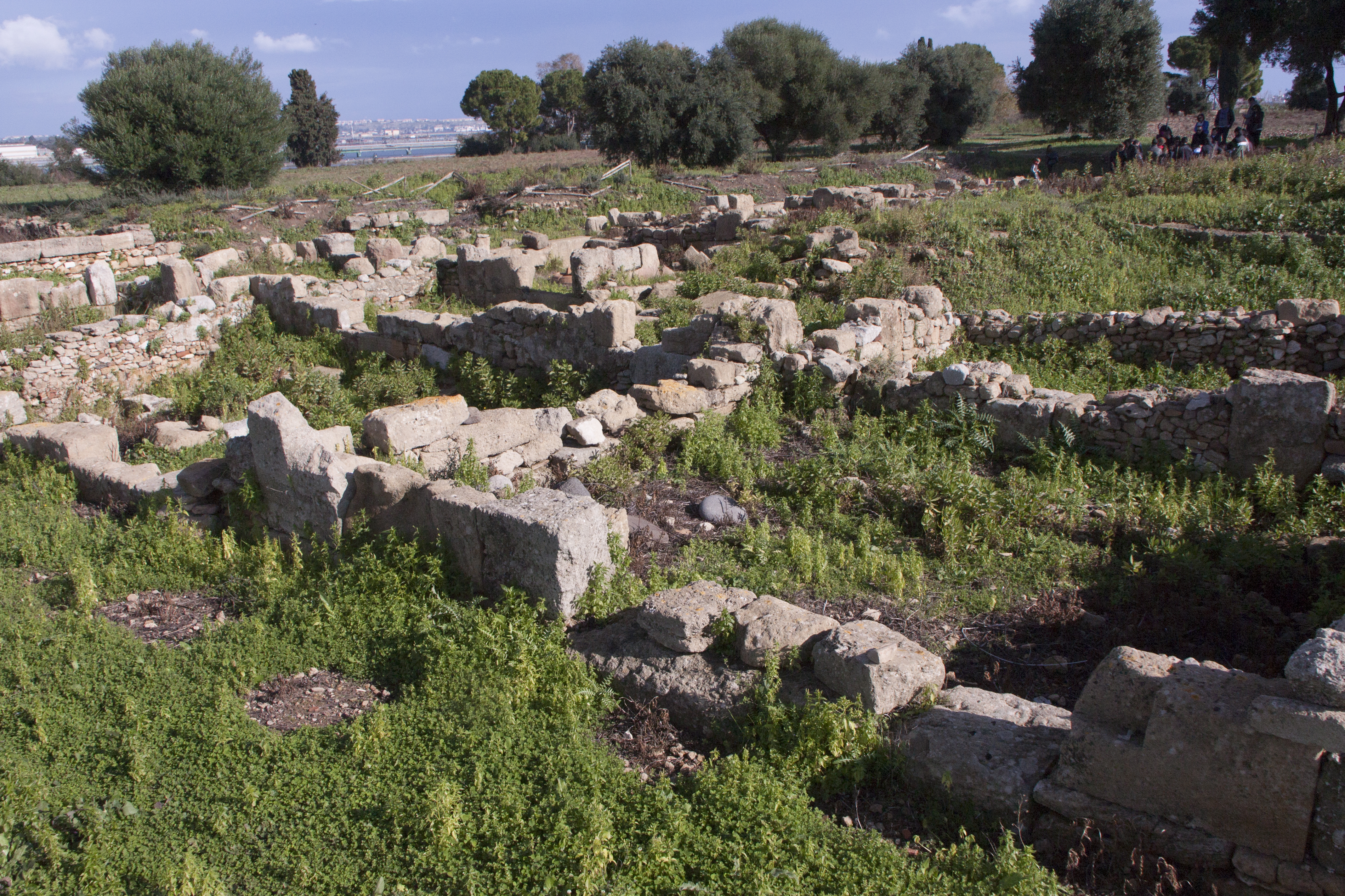 Santuario (Megara Hyblaea)